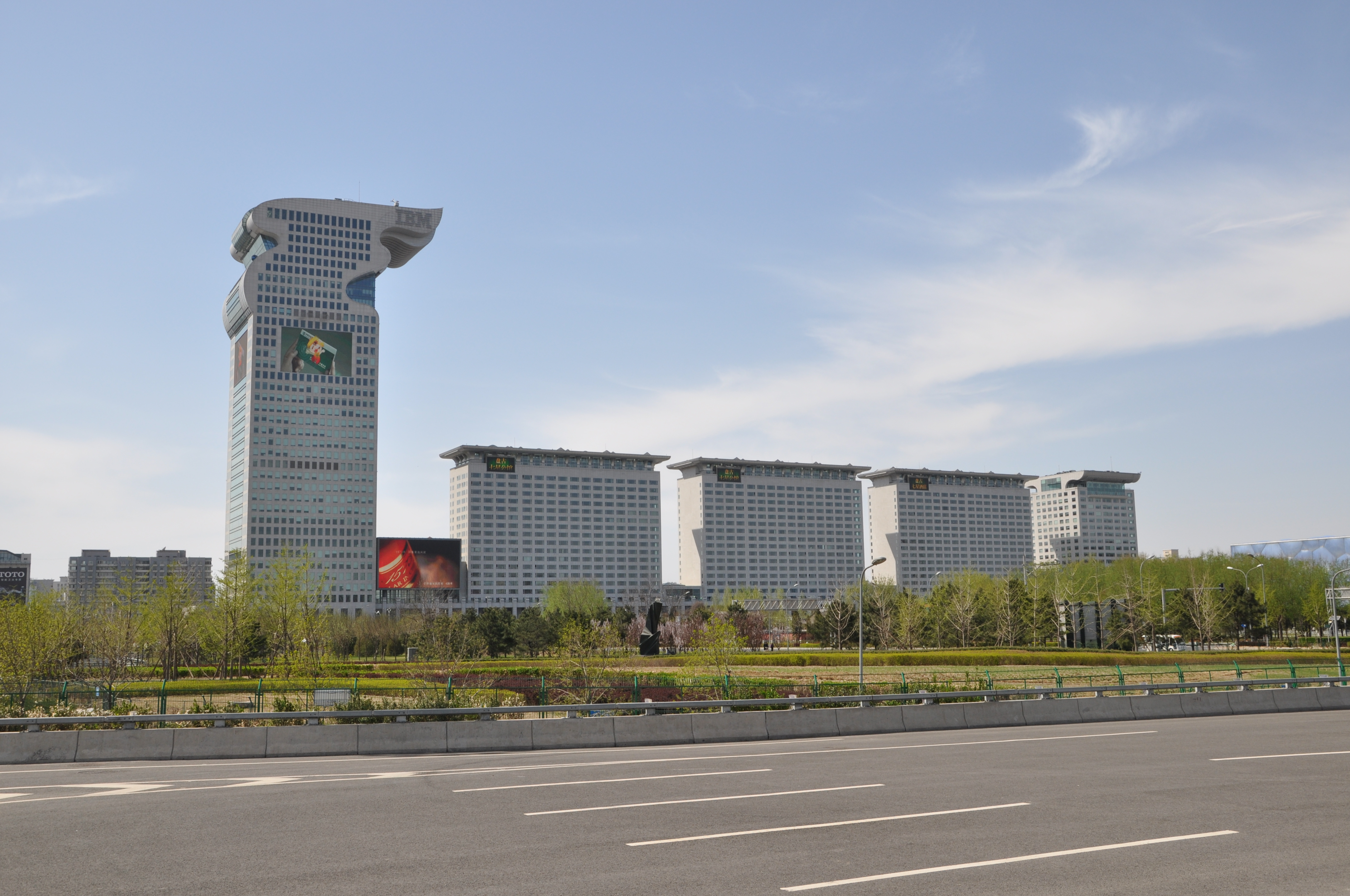 从东侧奥林匹克公园拍摄的盘古大观